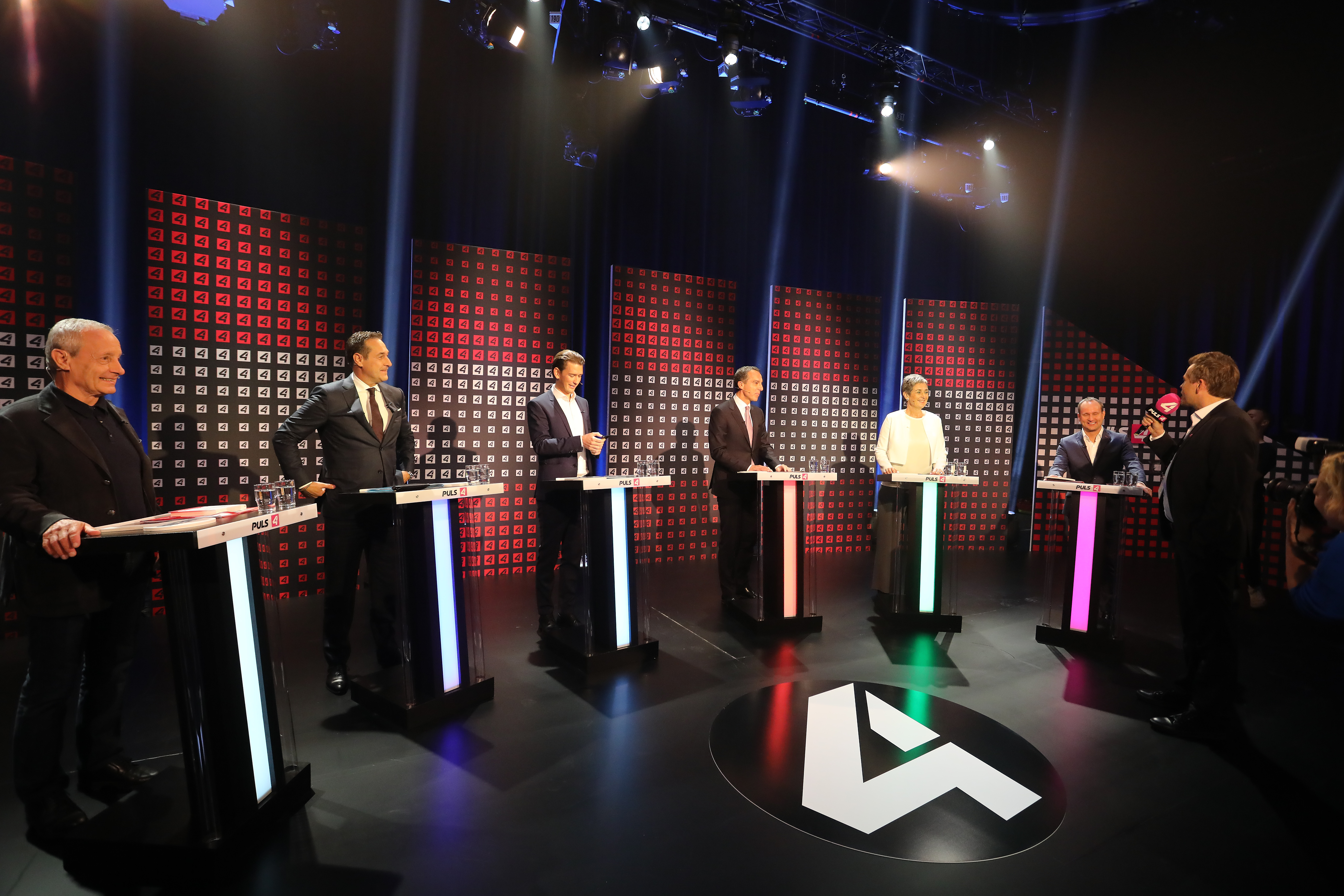 Puls 4-"Elefantenrunde" mit Bundeskanzler Christian Kern am 24.9.2017 (Fotos: SPÖ/Zach-Kiesling).